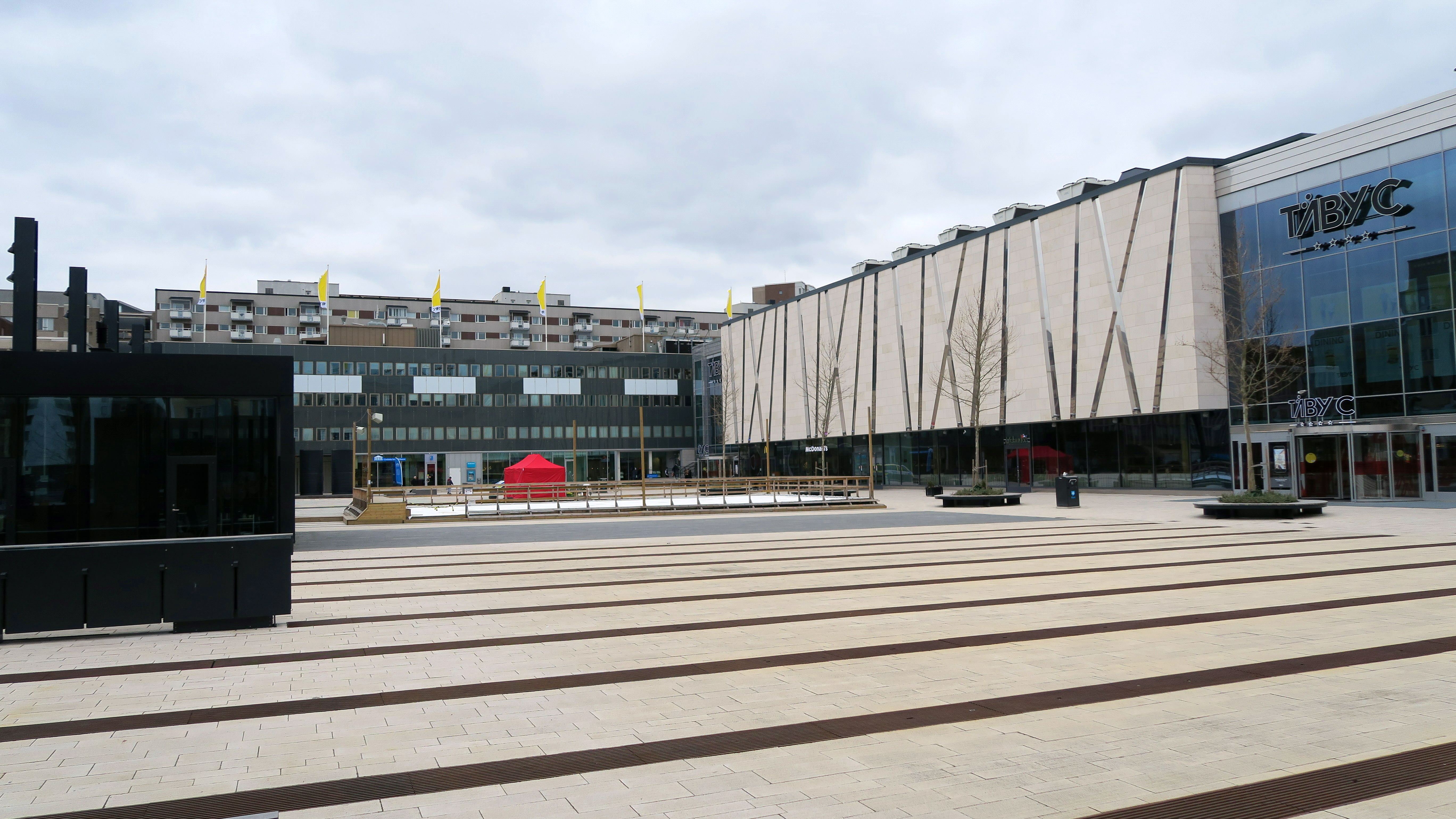 Täby centrum, torget, april 2017